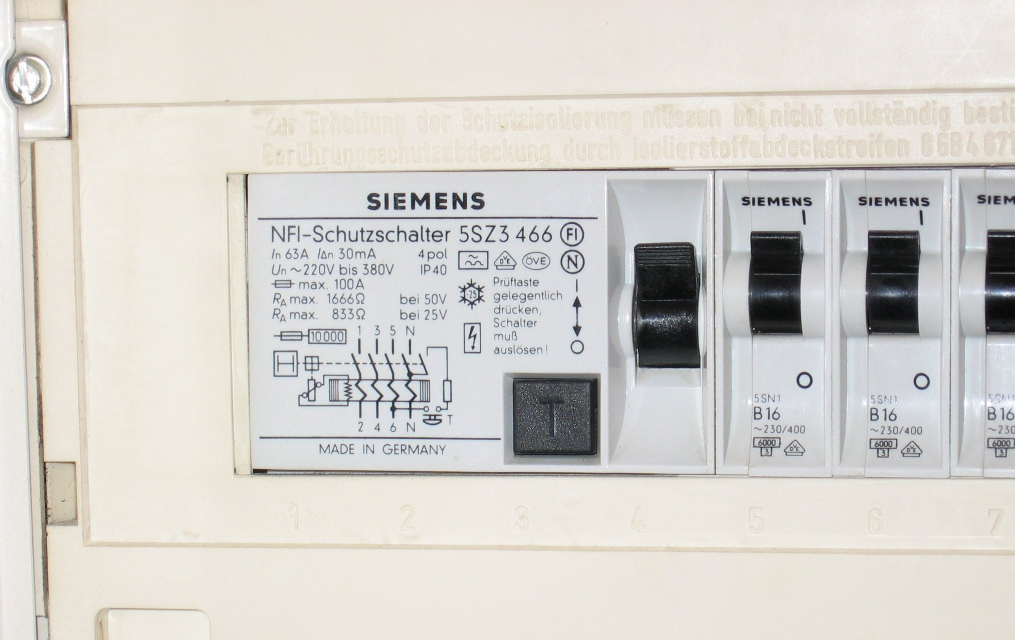 Fehlerstromschutzschalter eingebaut im Sicherungskasten selbst fotografiert